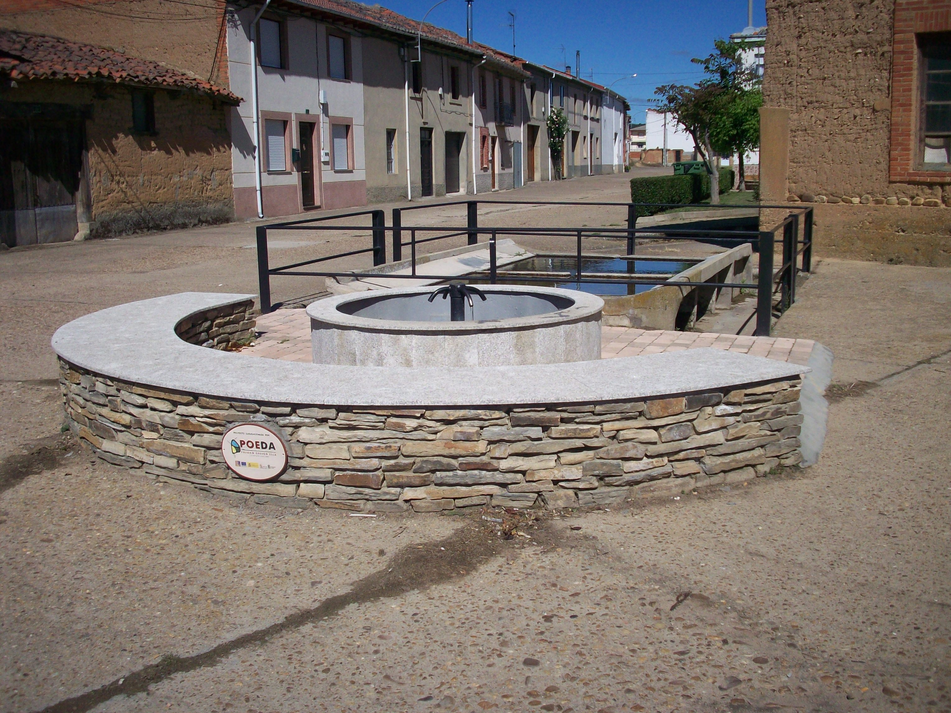 Pozo artesiano de Turcia, construido en 1931.